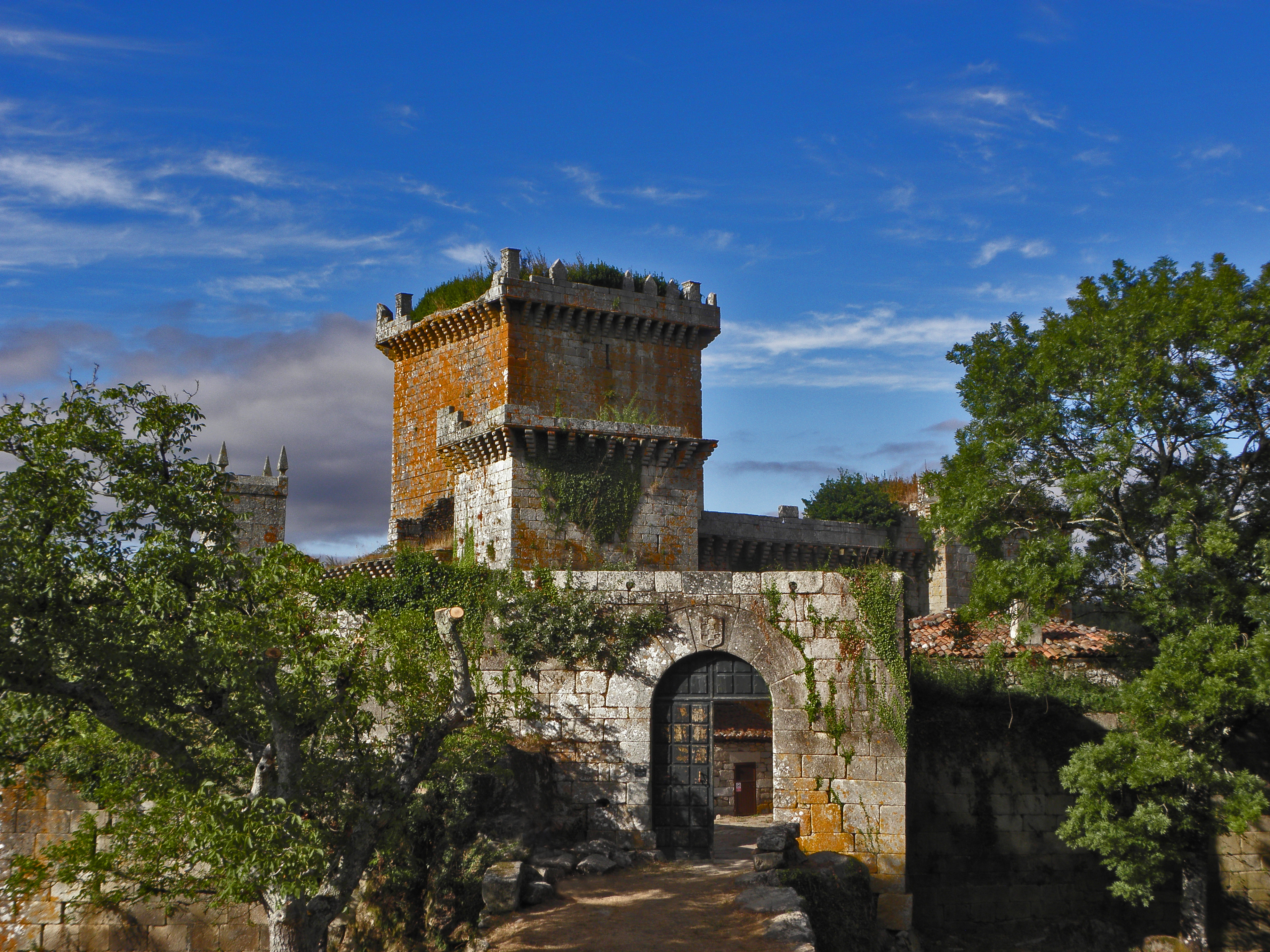 O Castelo de Pambre é unha das mellores mostras da arquitectura medieval militar que existe en Galicia, e das poucas que quedaron en pé trala revolta irmandiña. Foi construido a finais do século XIV por don Gonzalo Ozores de Ulloa. Foi un dos poucos castelos que non foron destruídos polos irmandiños, e salvouse grazas á astucia de Sancho Sánchez de Ulloa que tratou de falar cos sublevados nunha histórica reunión en Melide e que, ante as esixencias de que entregase o castelo e temendo pola súa vida, decide fuxir salvando a vida e o castelo que foi respectado polos irmandiños.